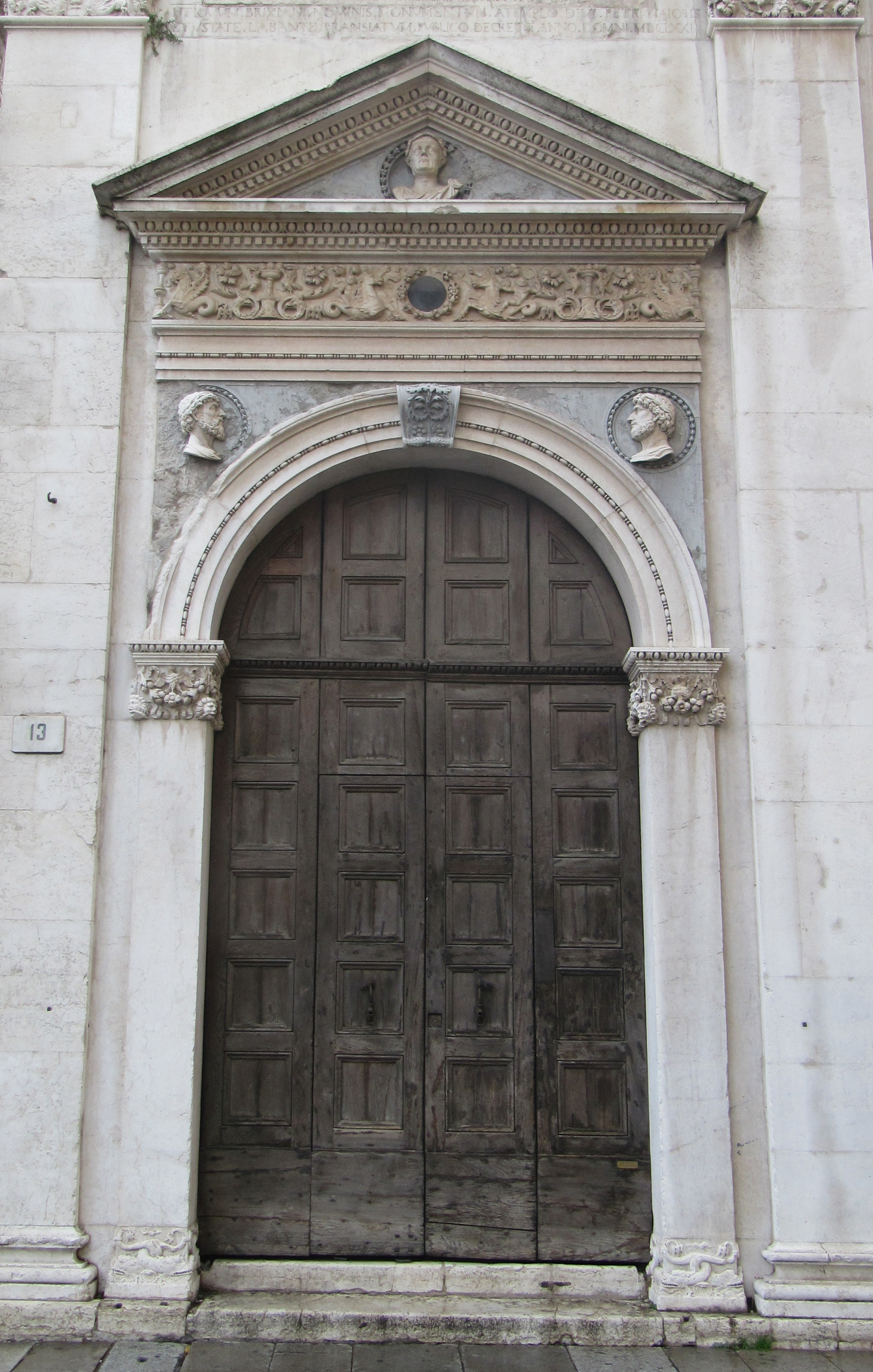 portale dello scalone, loggia, brescia (gasparo cairano)